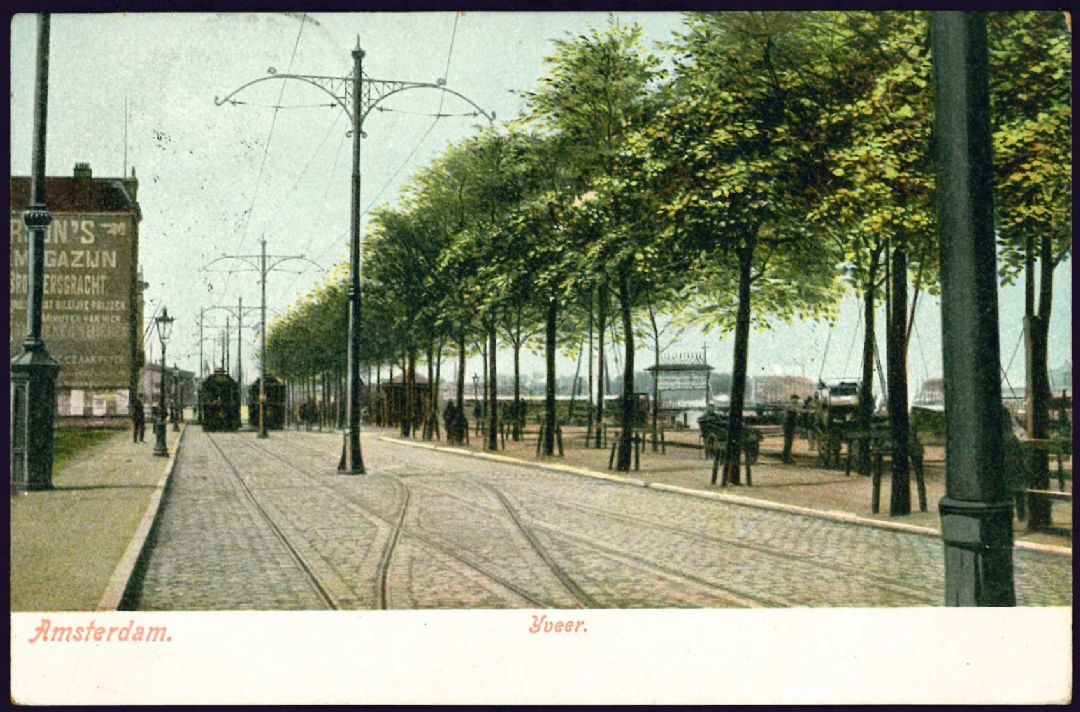 Photographed in Amsterdam between 1900 and 1914.